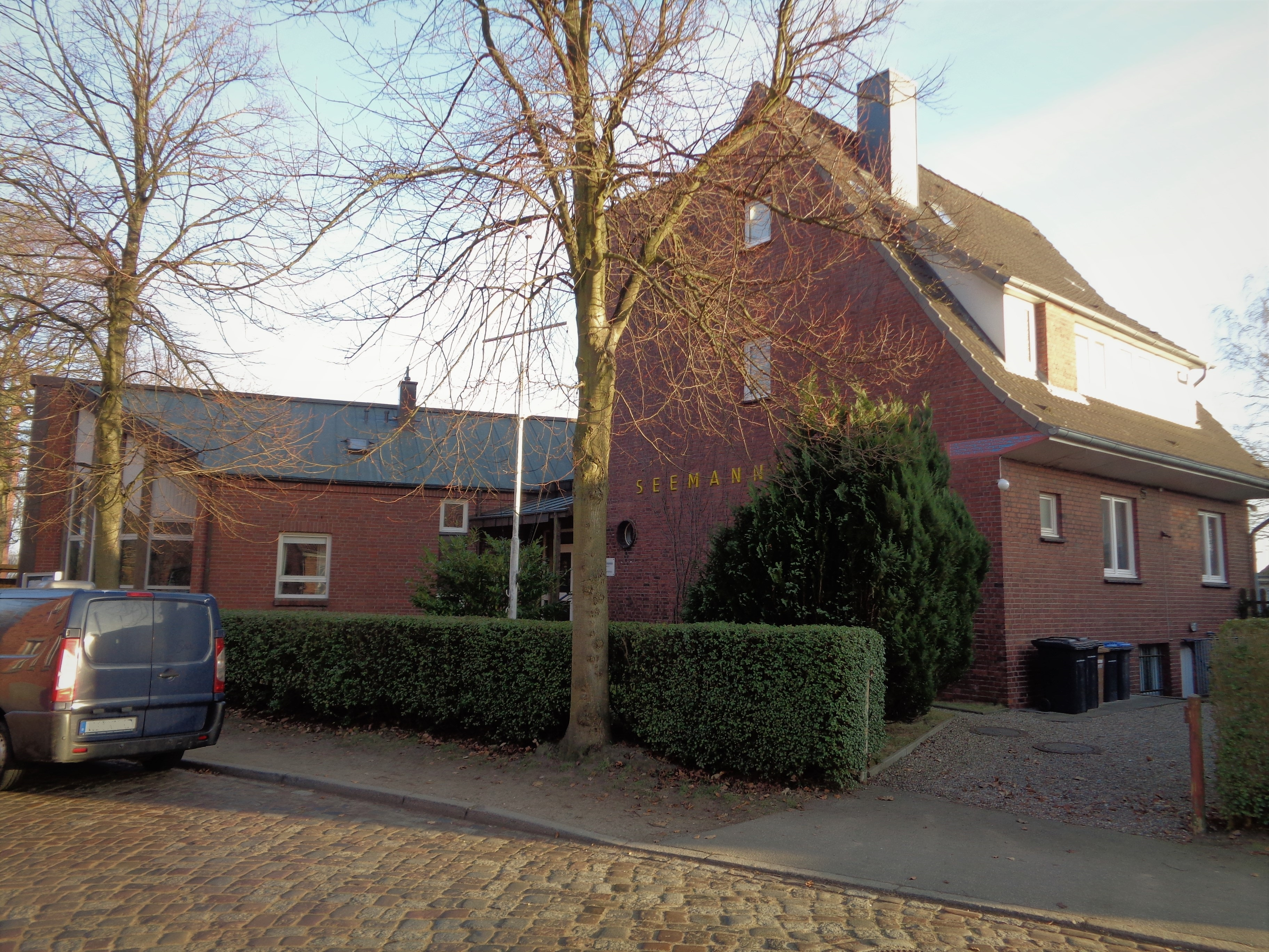 Das Seemannsheim im Kieler Stadtteil Holtenau.